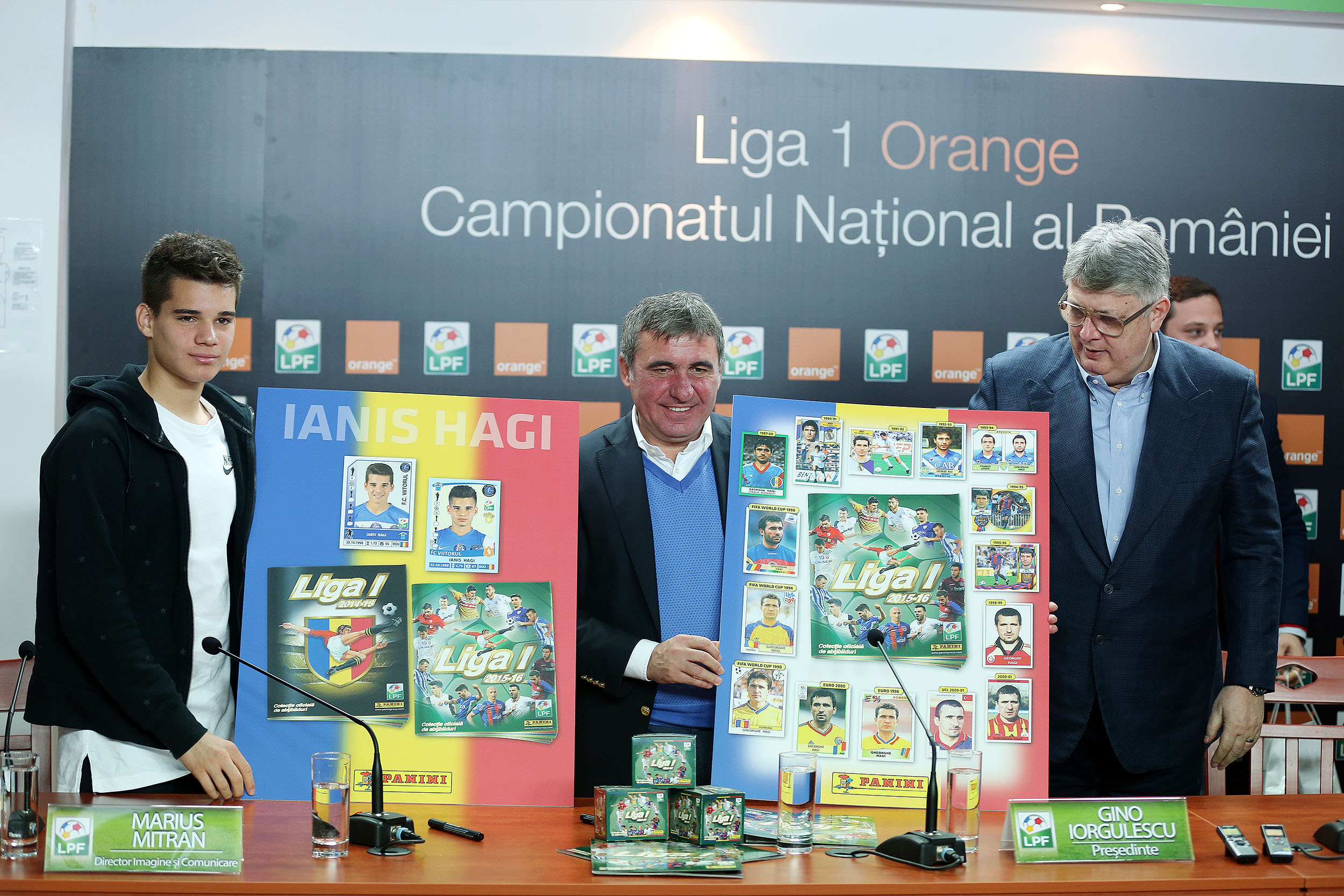 Ianis si Gica Hagi